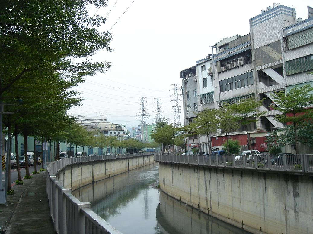 中和排水路(二八張溝)